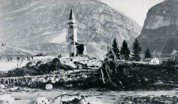 Pirago, 9 ottobre 1963